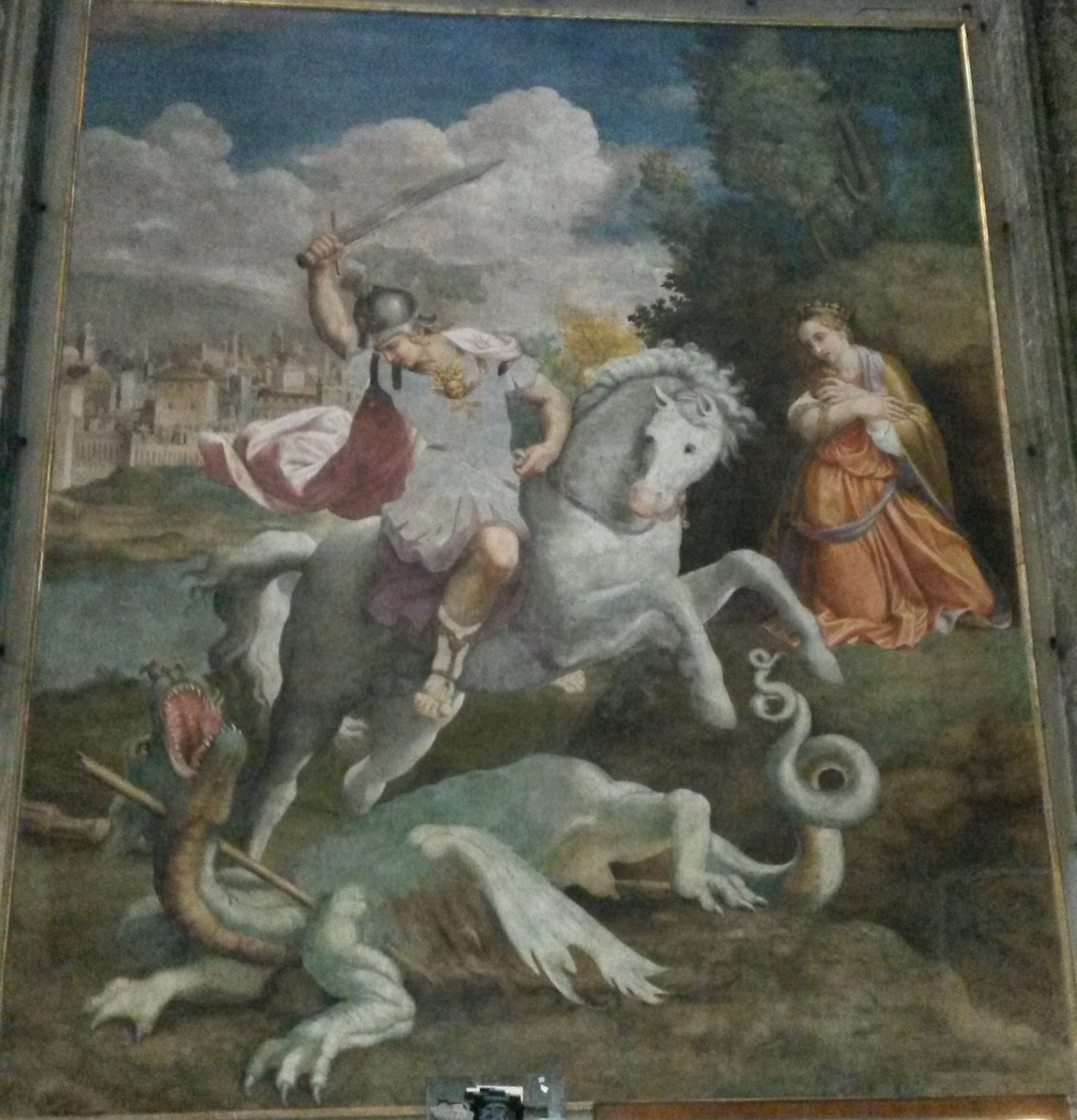 Basilica di Santa Maria di Campagna, Piacenza, Affrsco di Bernardino Gatti detto il Sojaro, San Giorgio che uccide il drago